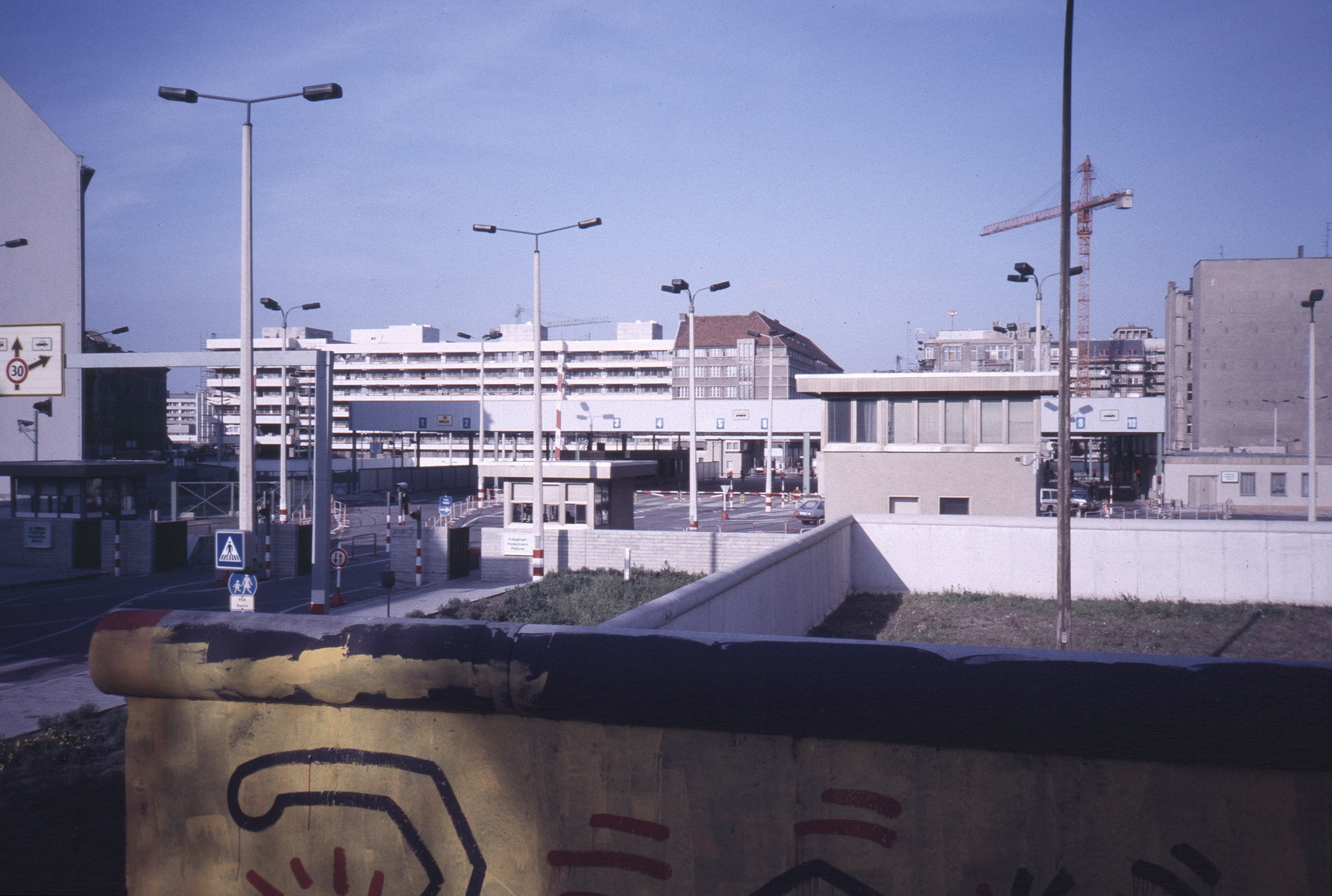 Checkpoint Charlie, picture taken from the western side, facing north